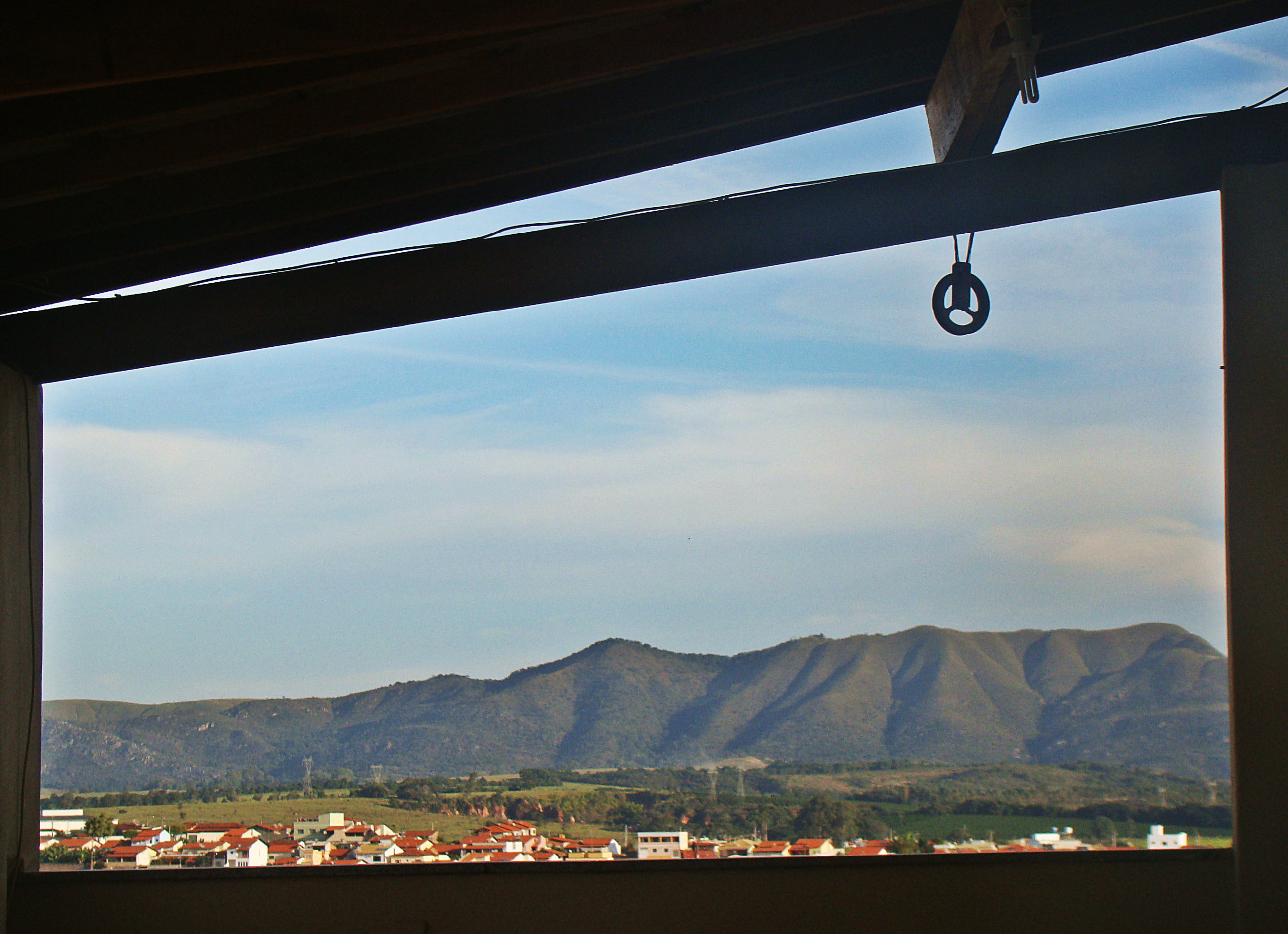 Morro da serrinha na cidade de Lavras-MG